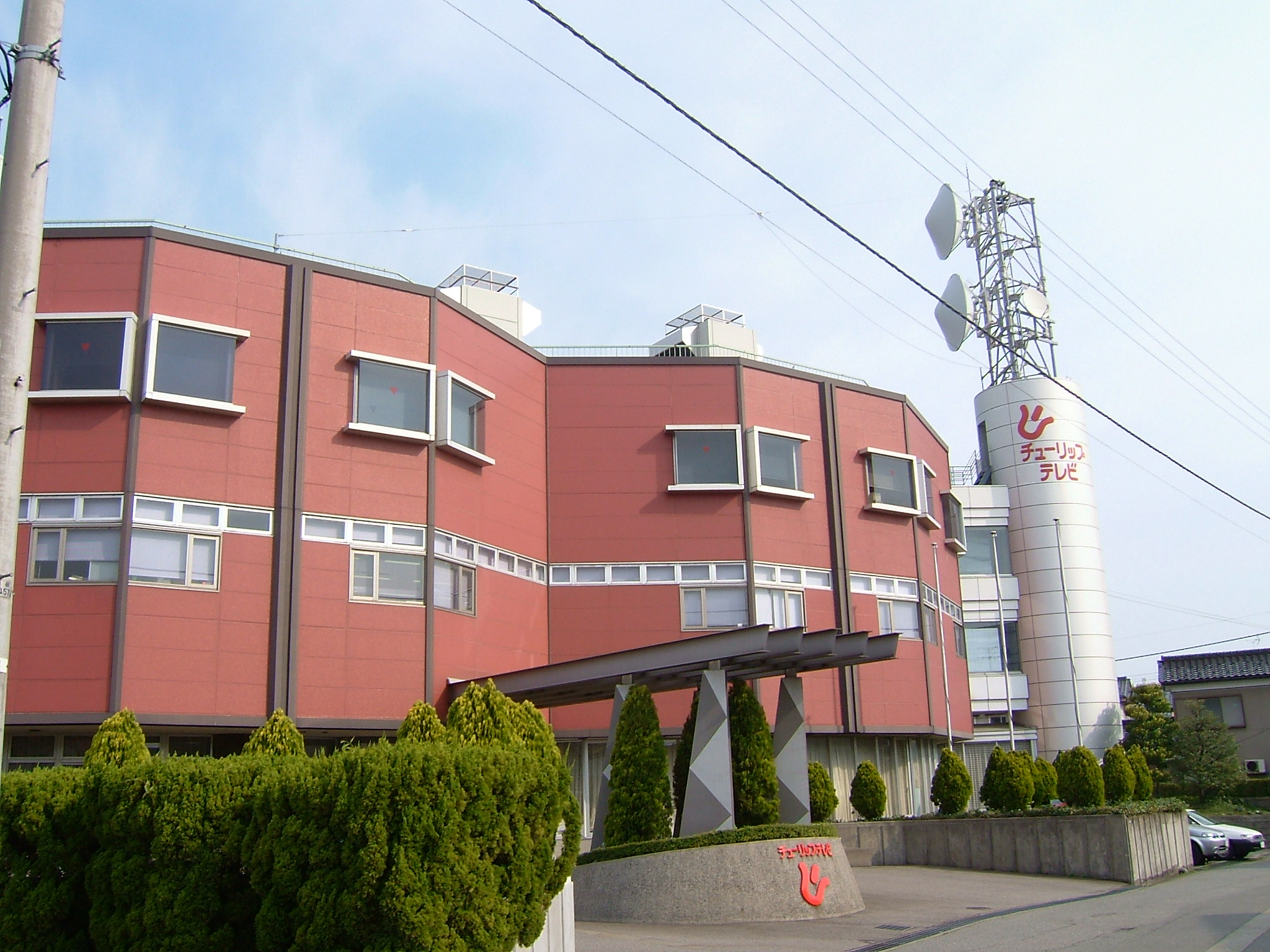 チューリップテレビ放送センター（富山県富山市）。隣には富山エフエム放送の本社がある。